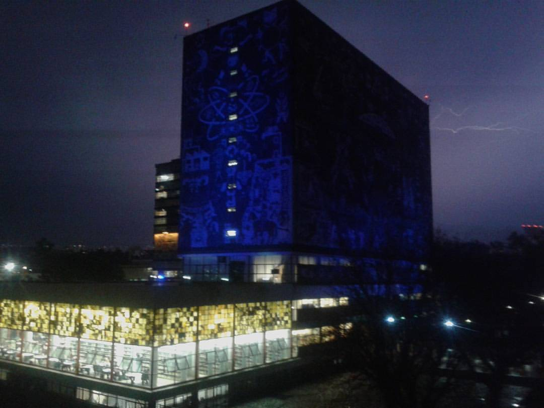 Biblioteca Central de la UNAM vista desde la Facultas de Filosofía y Letras